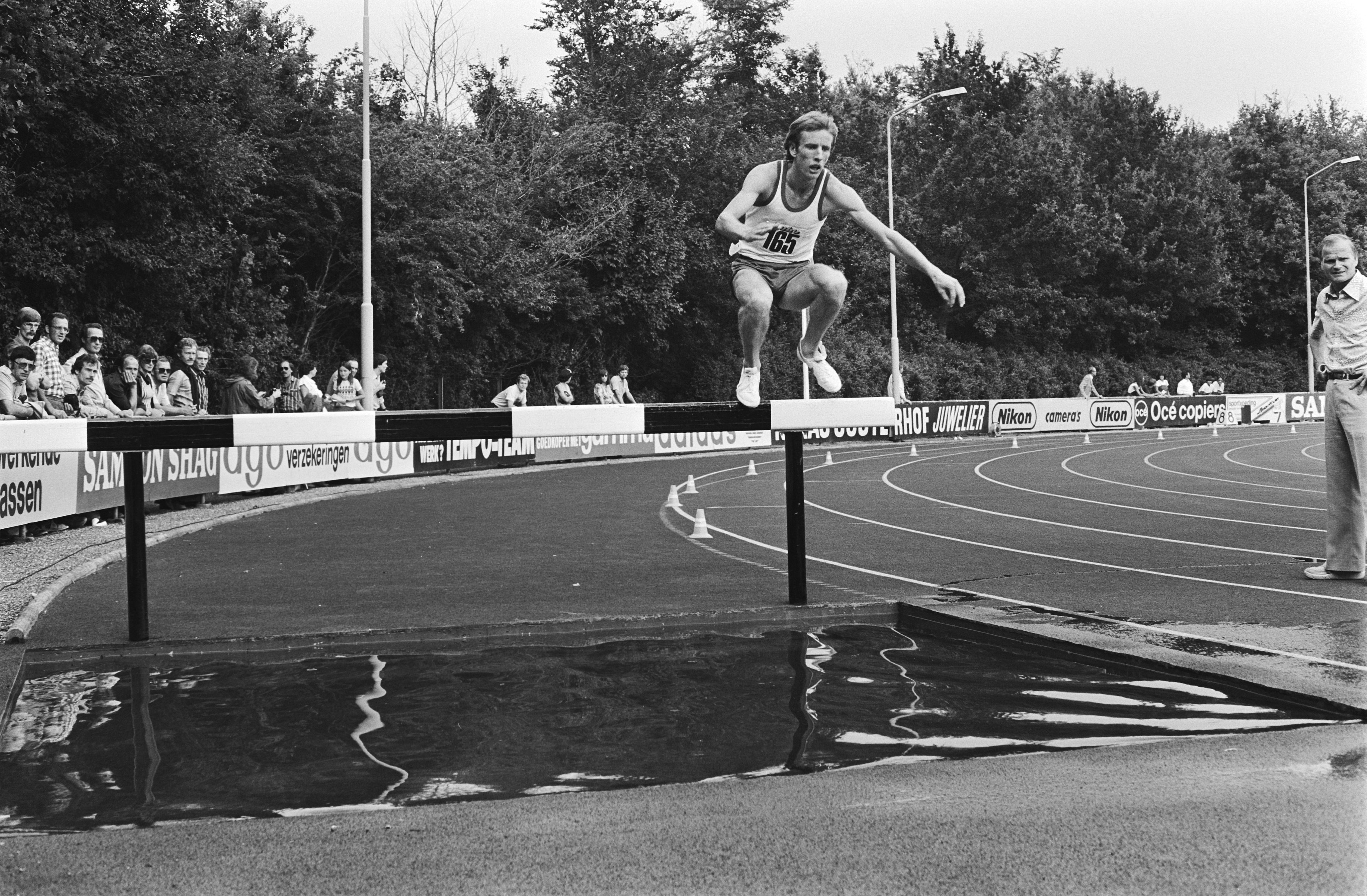 Collectie / Archief : Fotocollectie Anefo Reportage / Serie : Nederlandse kampioenschappen atletiek, Sittard Beschrijving : Winnaar steeple-chase Hans Koeleman (nummer 165) in aktie Datum : 9 augustus 1980 Locatie : Limburg, Sittard Trefwoorden : atletiek, kampioenschappen, sport Persoonsnaam : Koeleman, Hans Fotograaf : Antonisse, Marcel / Anefo Auteursrechthebbende : Nationaal Archief Materiaalsoort : Negatief (zwart/wit) Nummer archiefinventaris : bekijk toegang 2.24.01.05 Bestanddeelnummer : 930-9545